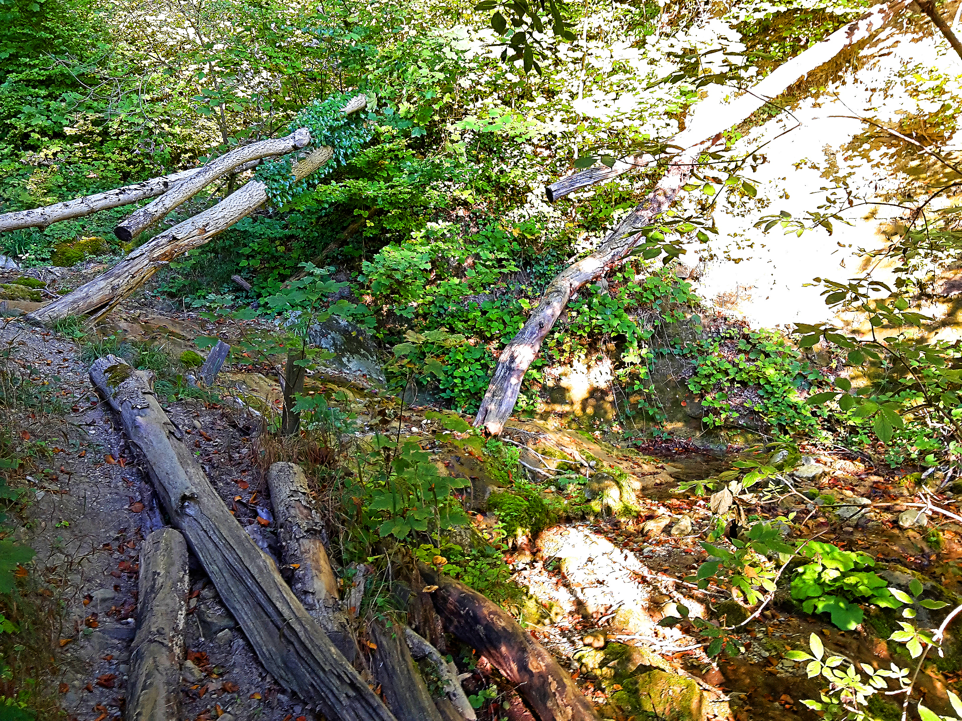 Ziegelbach im Waldgebiet Hard, Zufikon. Der Weg ins Ziegelbach-Tobel ist gesperrt